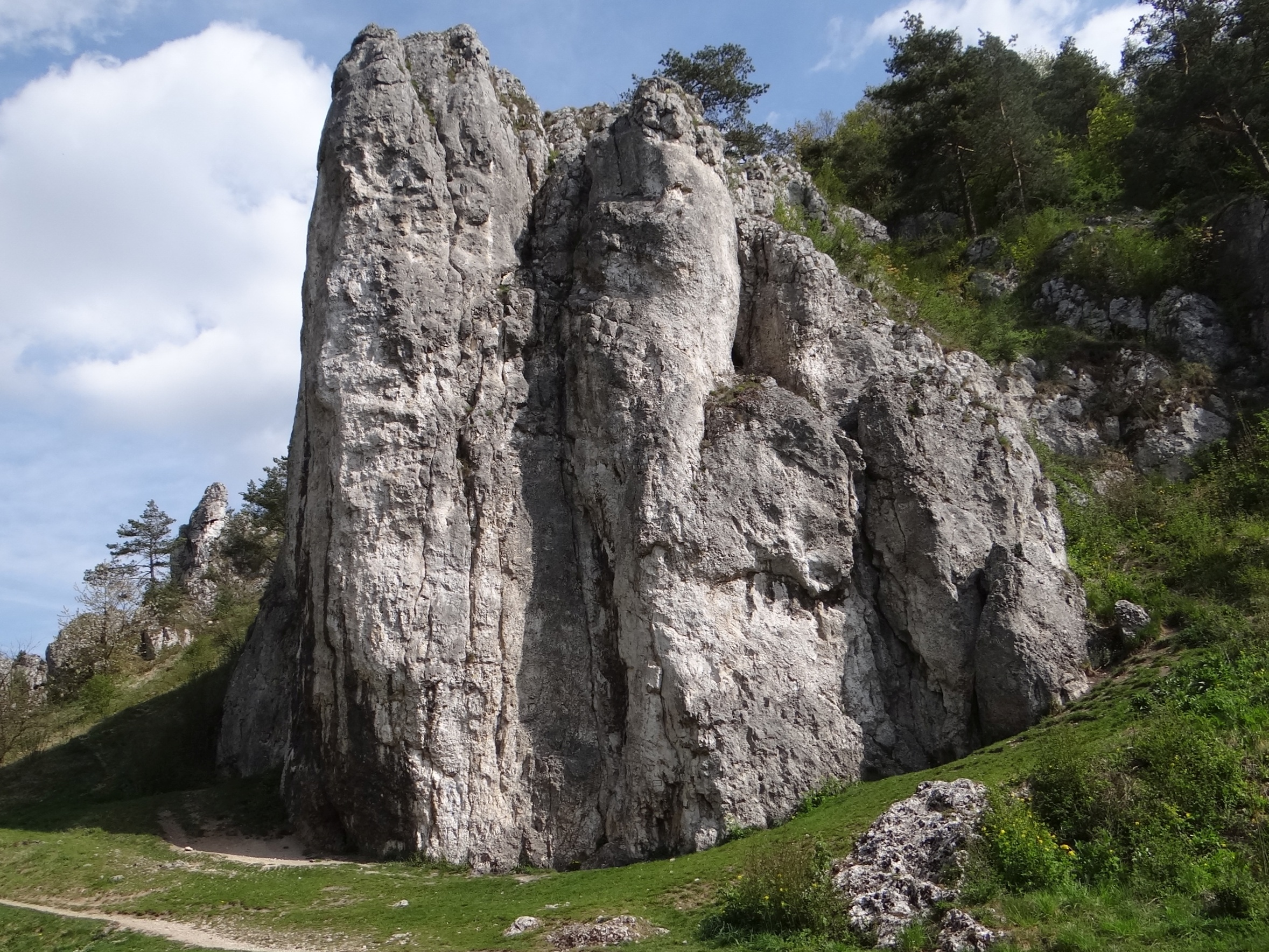 Filar Abazego w Dolinie Bolechowickiej